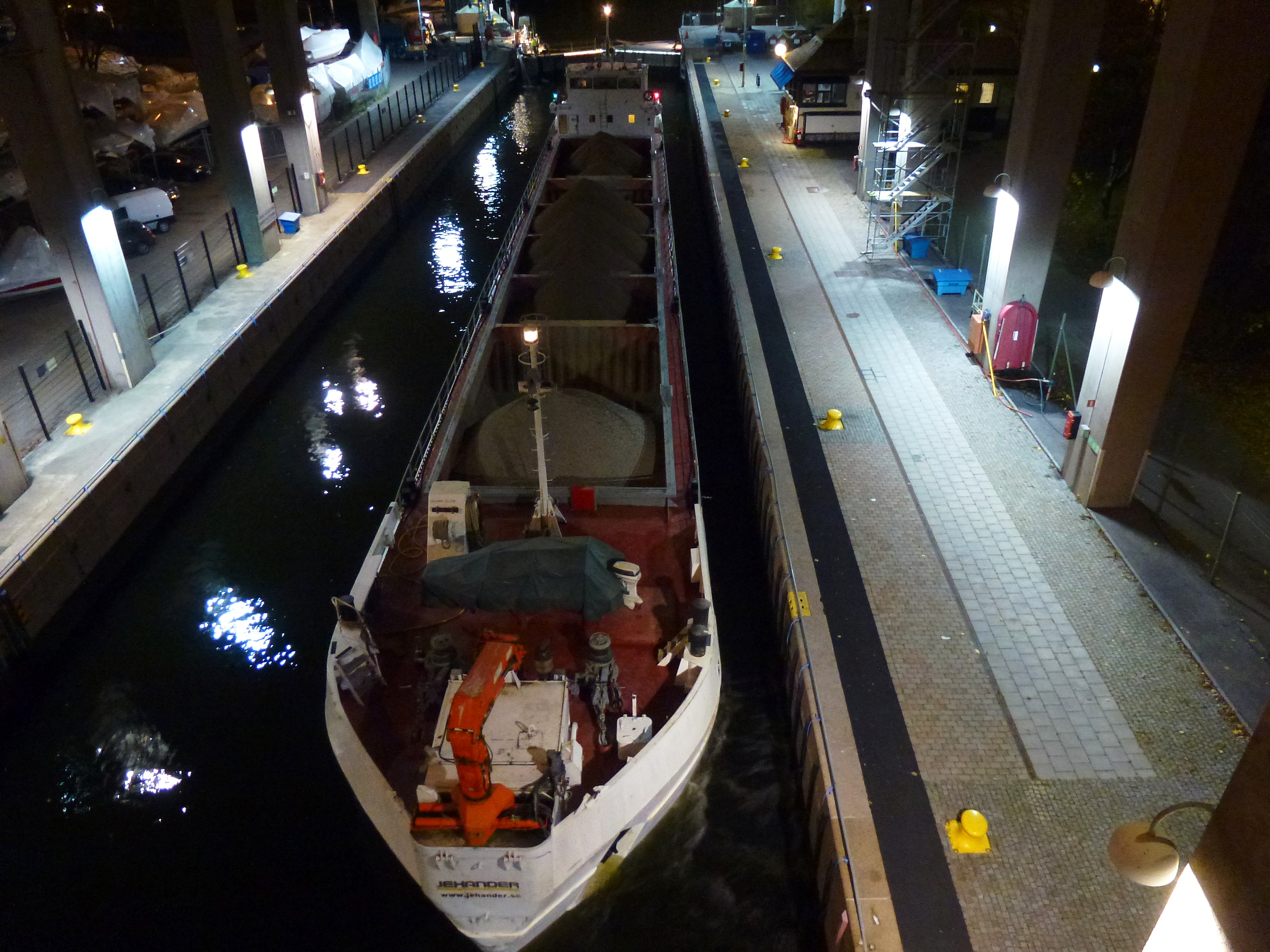 Jehanders grusfartyg i Hammarbyslussen